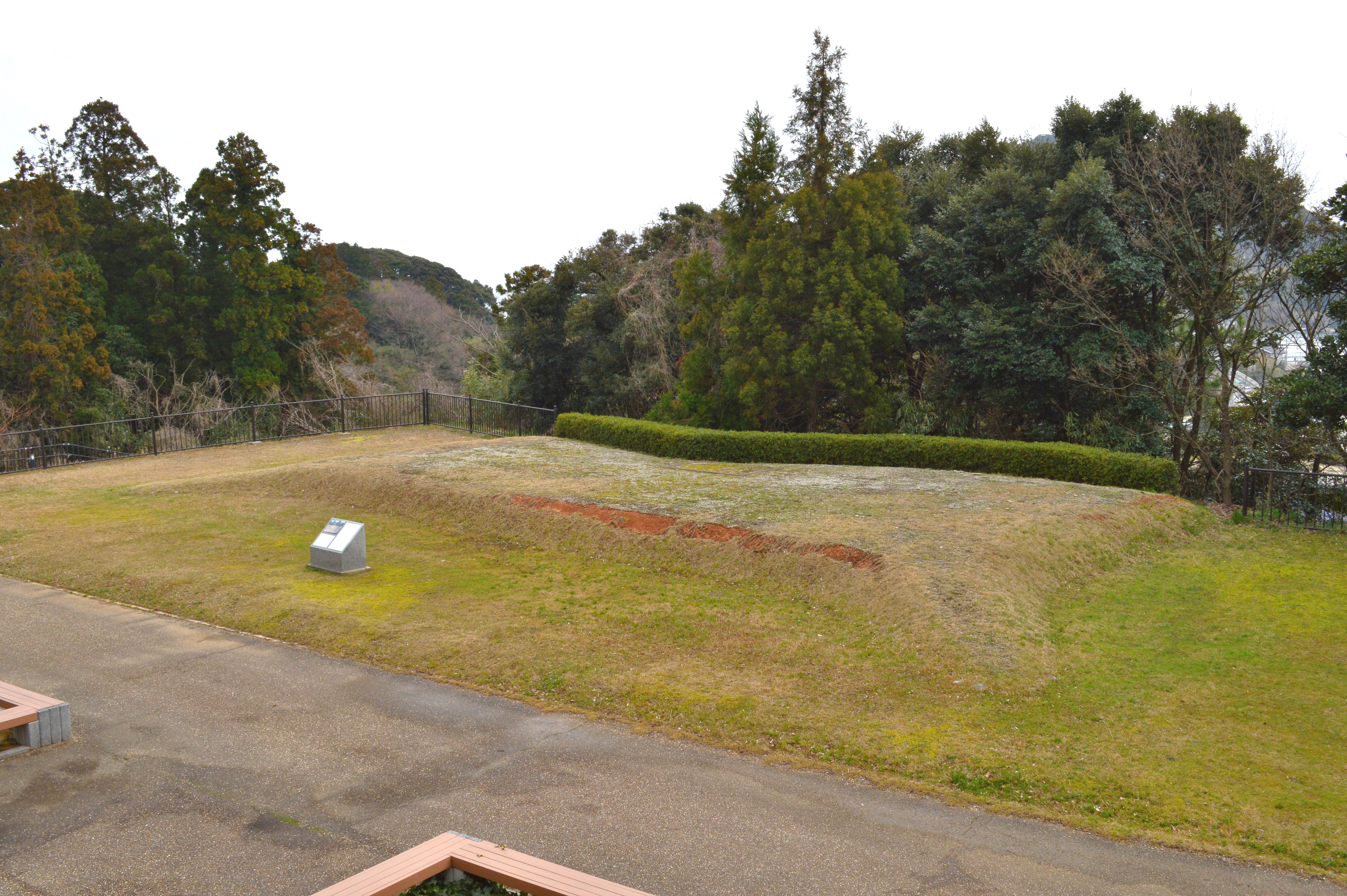 大城墳丘墓 全景